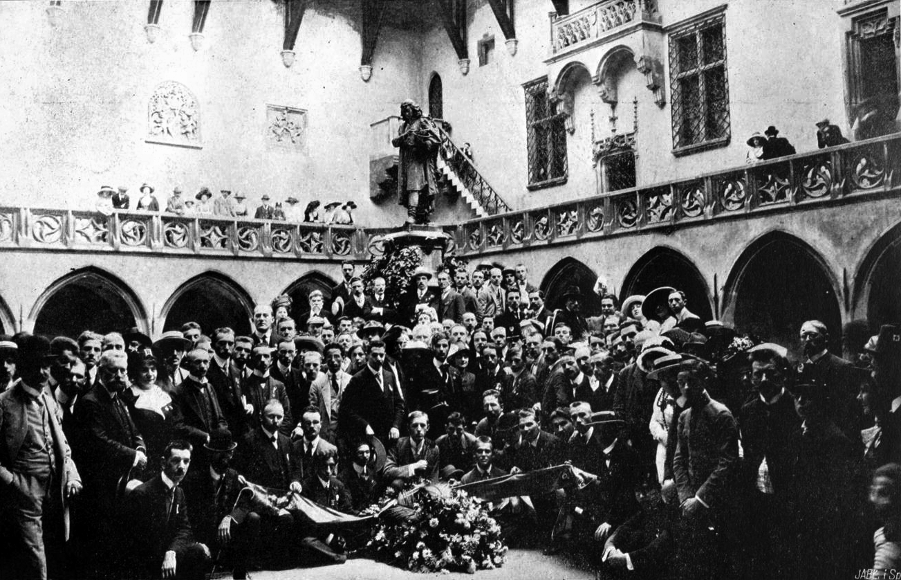 UK 1912, Krakovo. Kongresanoj metantaj florkronon ĉe la monumento de Kopernik staranta en la korto de Jagellona Biblioteko